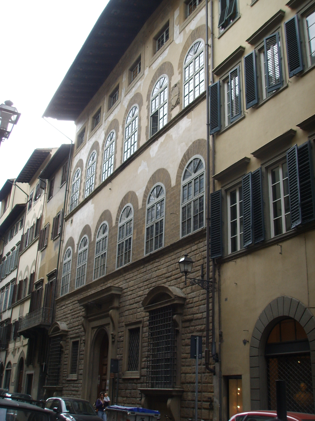 Palazzo corsini suarez, esterno